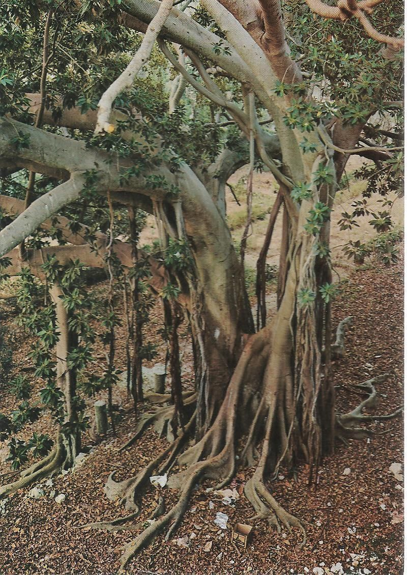 Albero Secolare di Siracusa